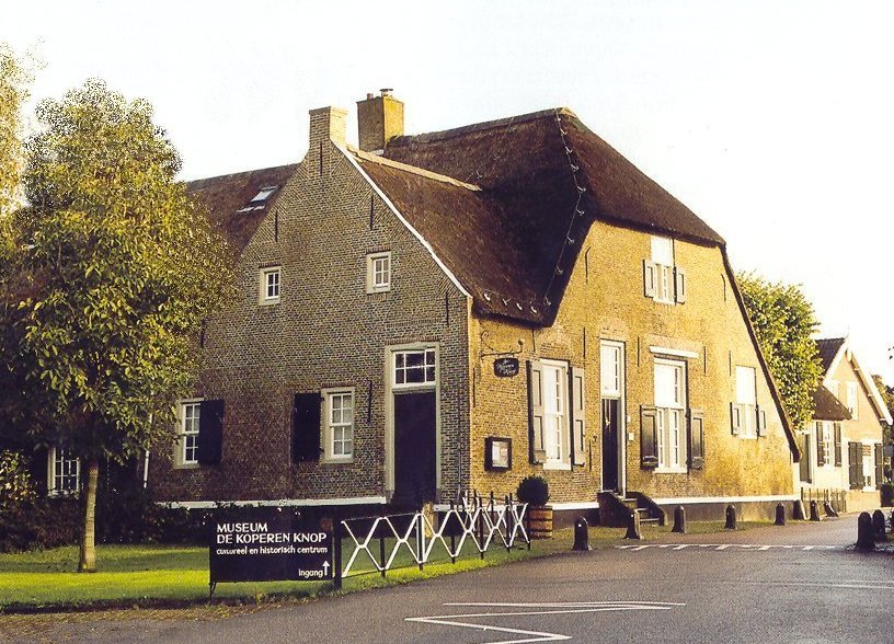 Historisch Streekmuseum De Koperen Knop Scan van een eigen foto, beschikbaar onder GFDL